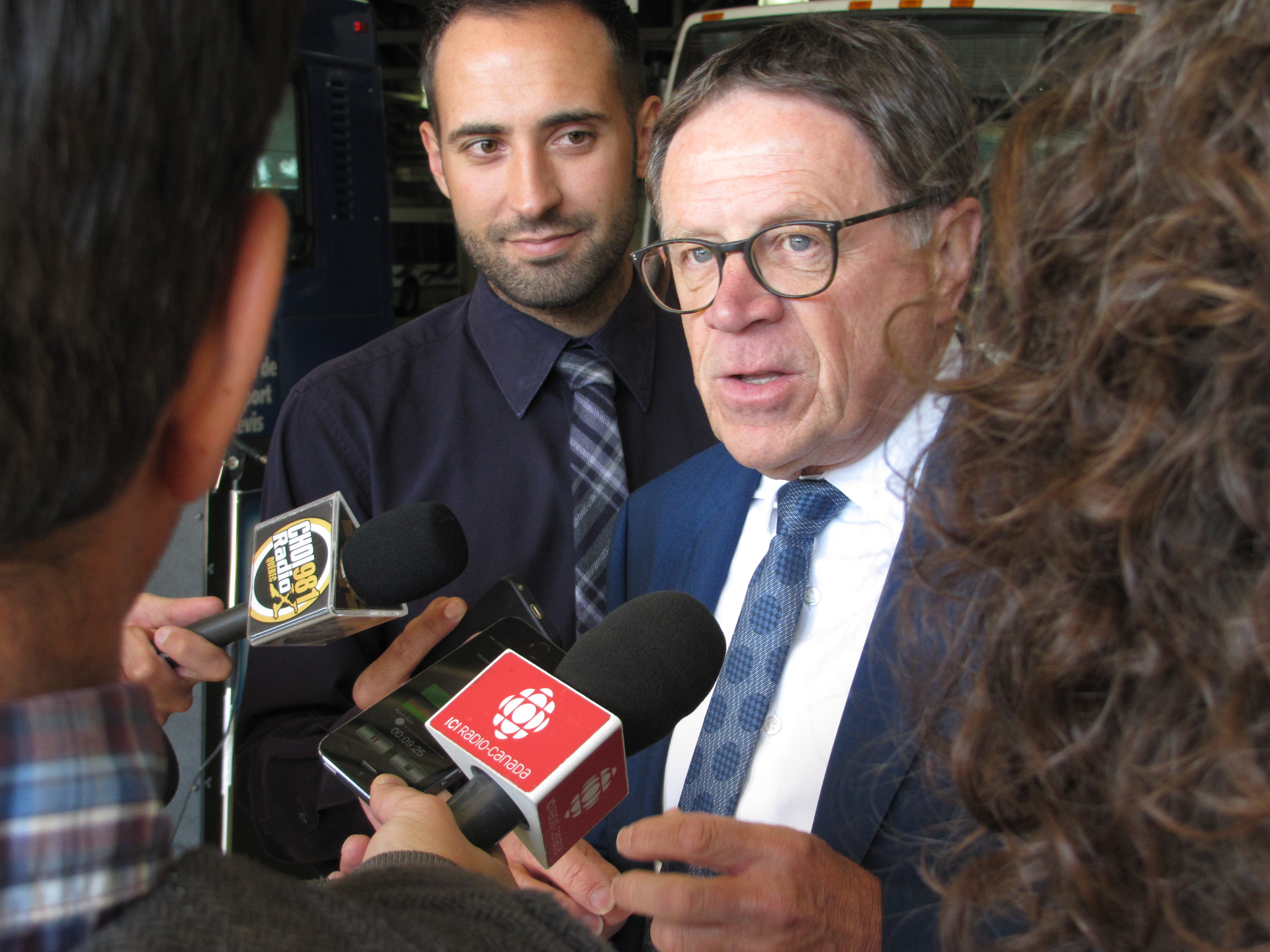 Le maire de Lévis, Gilles Lehouillier (droite) répond aux questions des journalistes pendant une conférence de presse à la Société de transport de Lévis, le 23 septembre 2015.